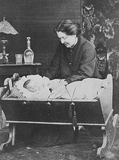 Portret Celiny z Treterów Dominikowskiej (? - 1910) z Kordziem w kołysce.